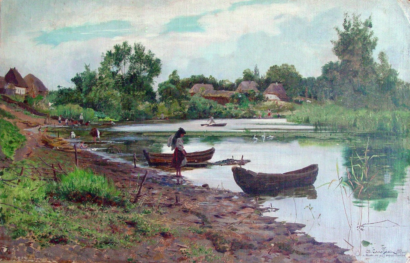 Опанас Сластіон — "На річці Хорол, село Білики Полтавської губернїї", 1907